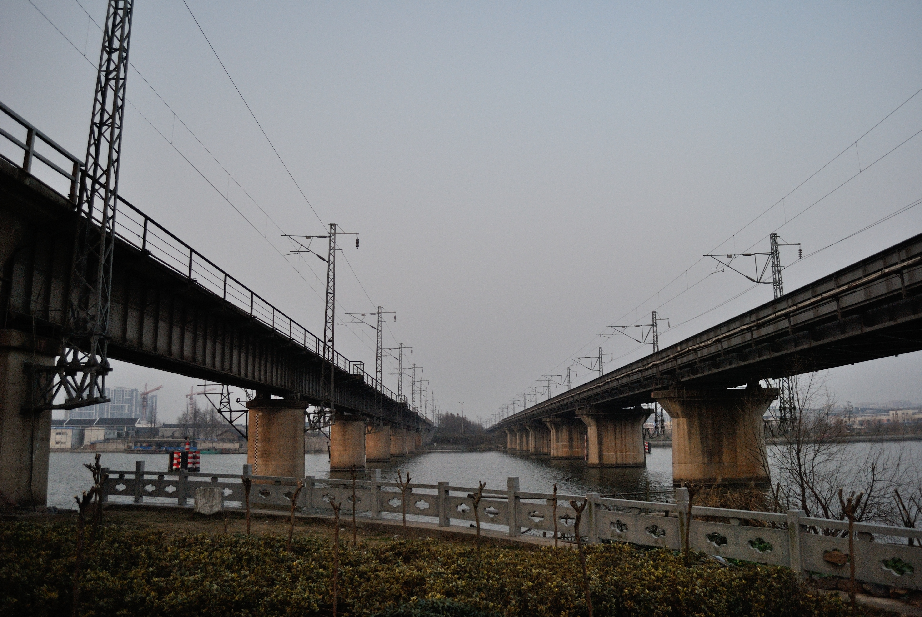 青林渡铁路桥上下行桥梁